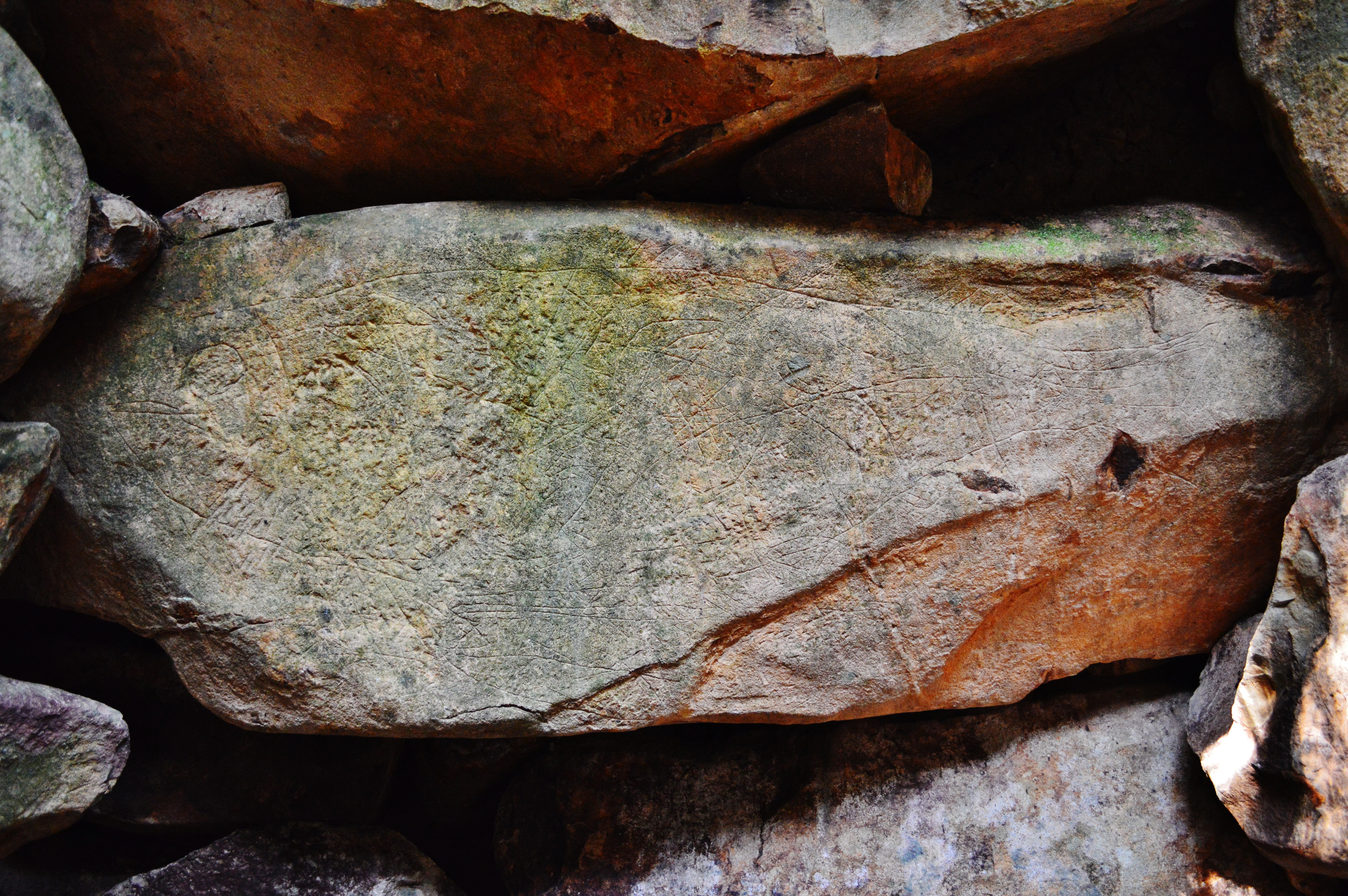 鷺山古墳 (鳥取市) 玄室の魚形文線刻画 Nikon D3200